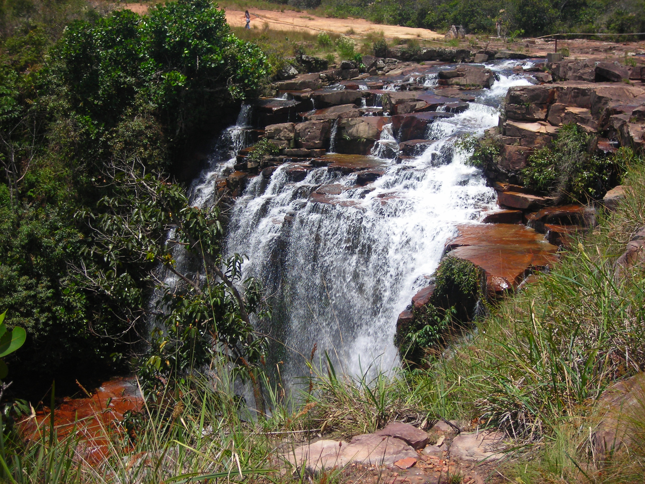 Cachoeira do Pacheco, Venezuela. Pacheco Waterfall, Venezuela.